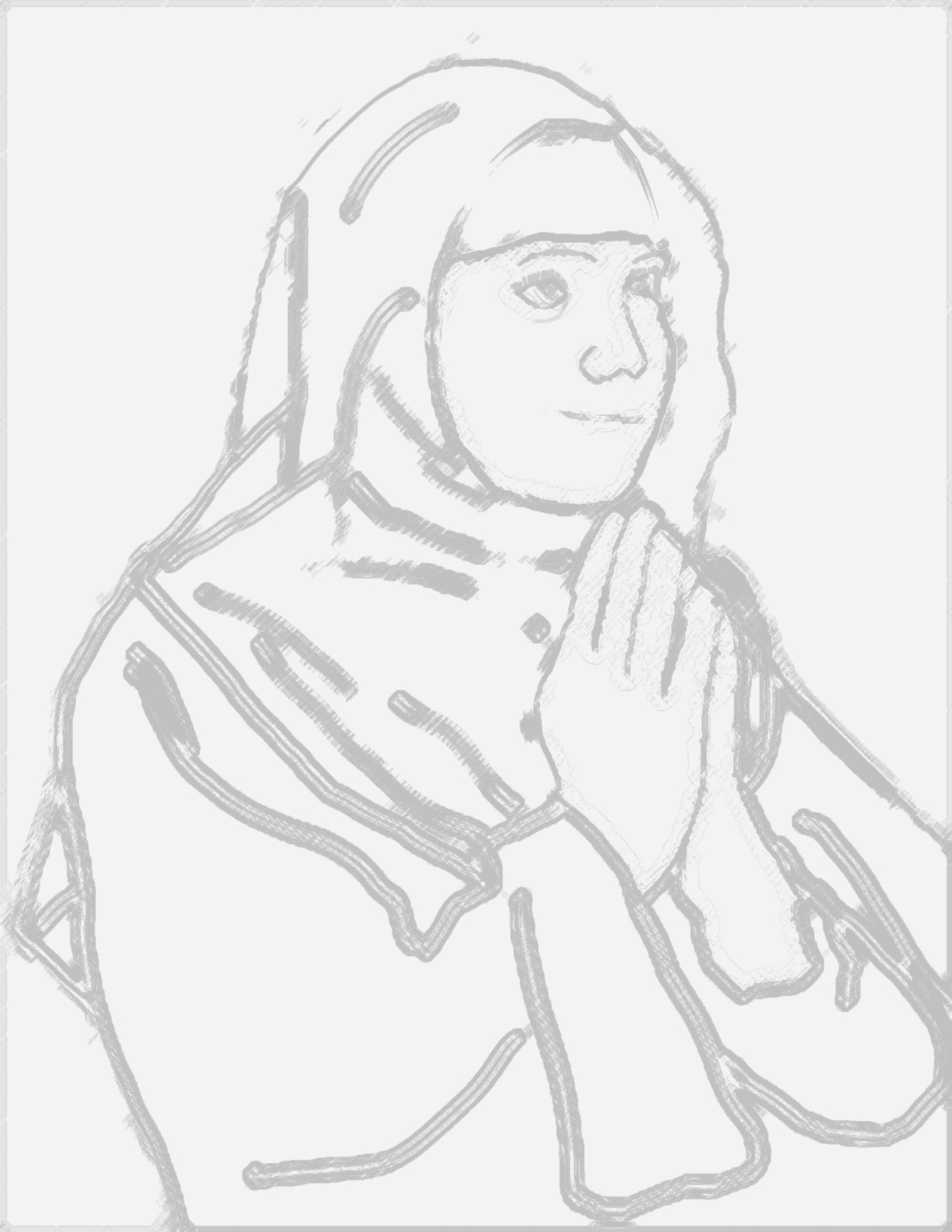 Imagen idealizada de Beatriz de Asís